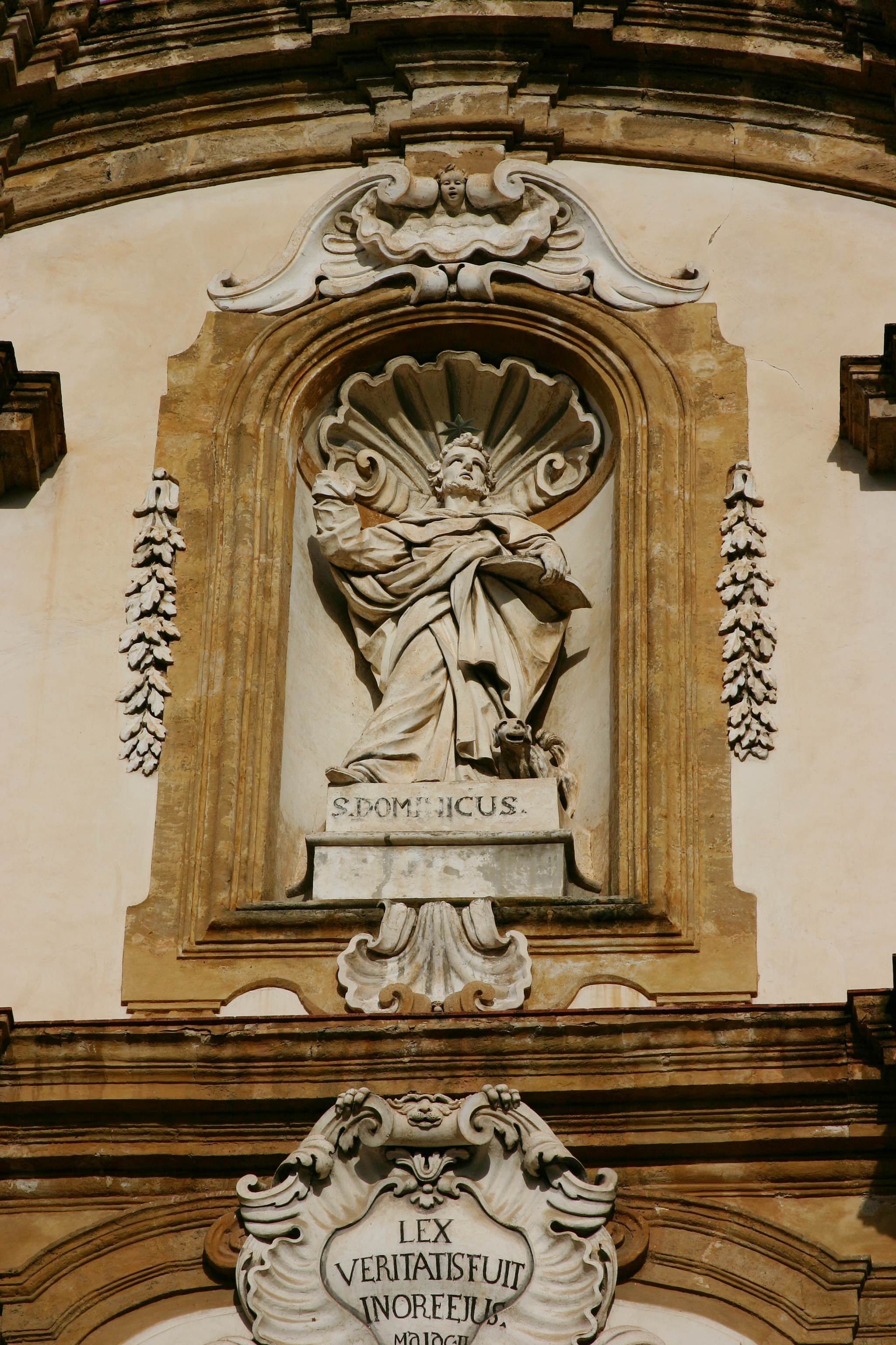 San Domenico - Palermo